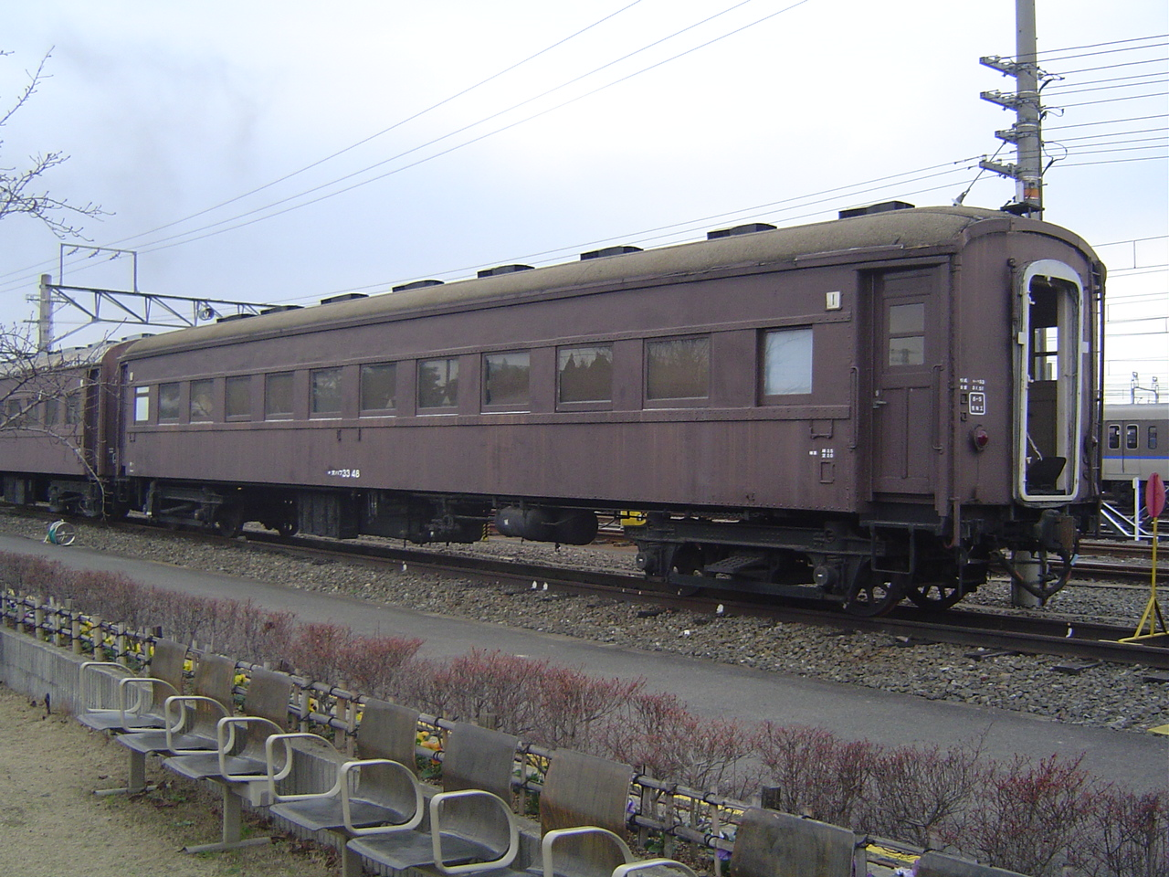 西日本旅客鉄道オハフ3348号客車。